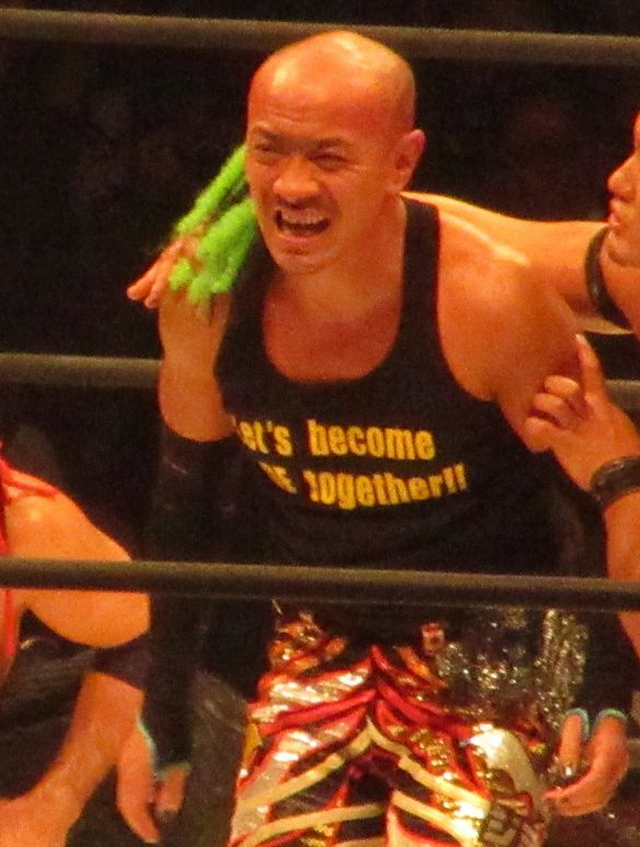 2016.11.3大阪